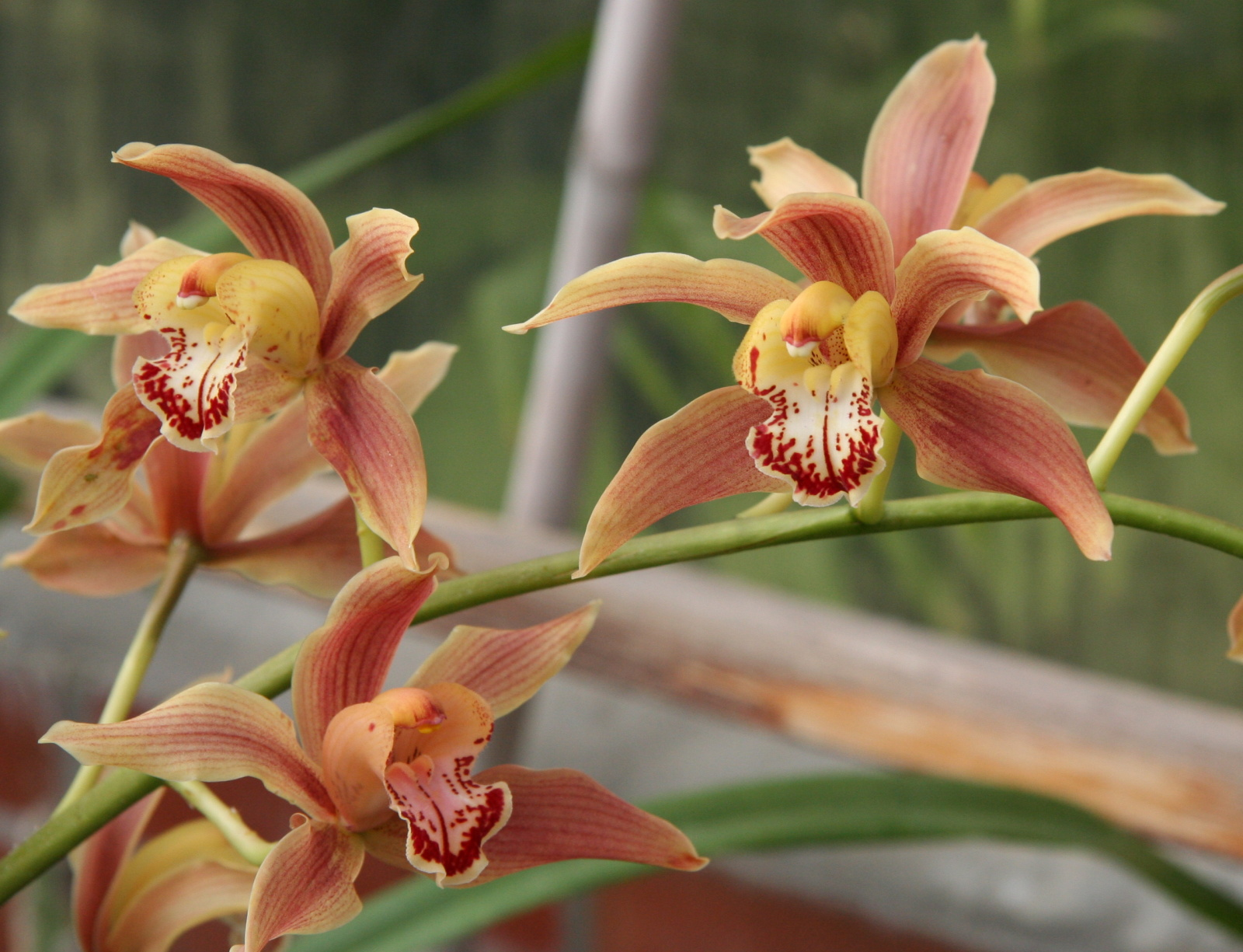 Cymbidium hybrid im Botanischen Garten Dresden